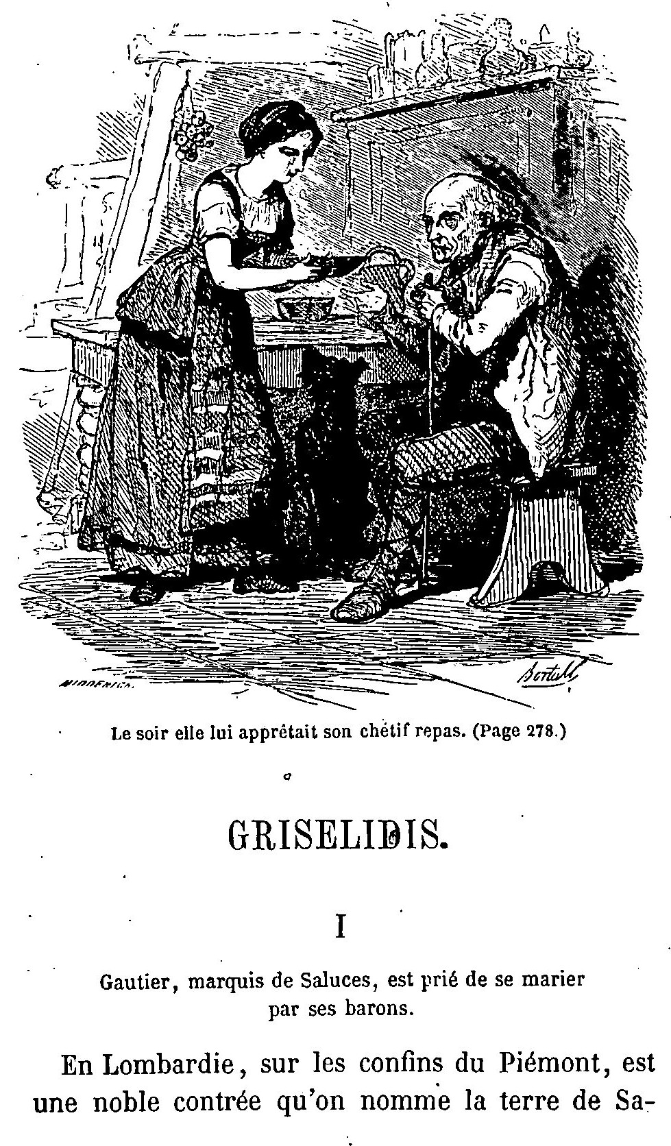 Légendes pour les enfants arrangées par Paul Boiteau, et illustrées de 42 vignettes par Bertall : Griselidis.